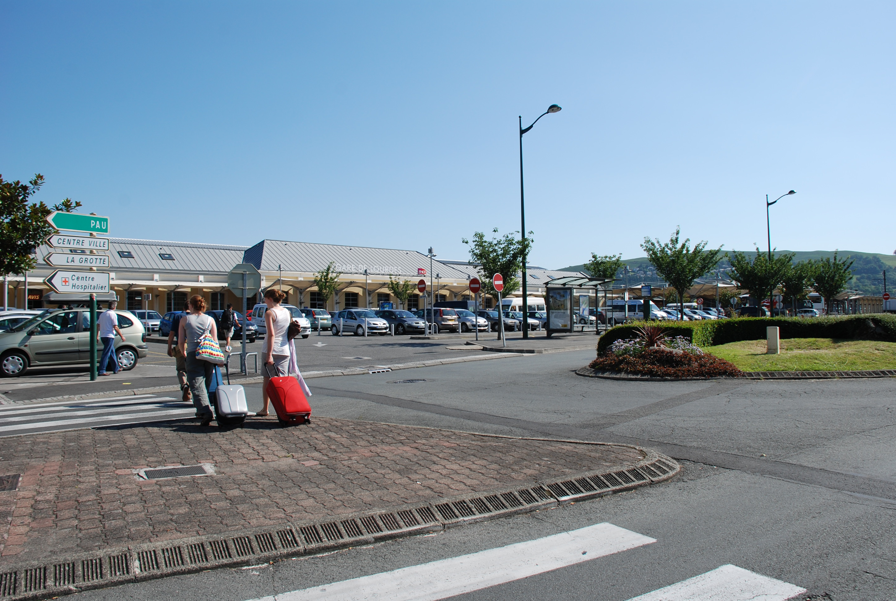 Place de la gare à Lourdes